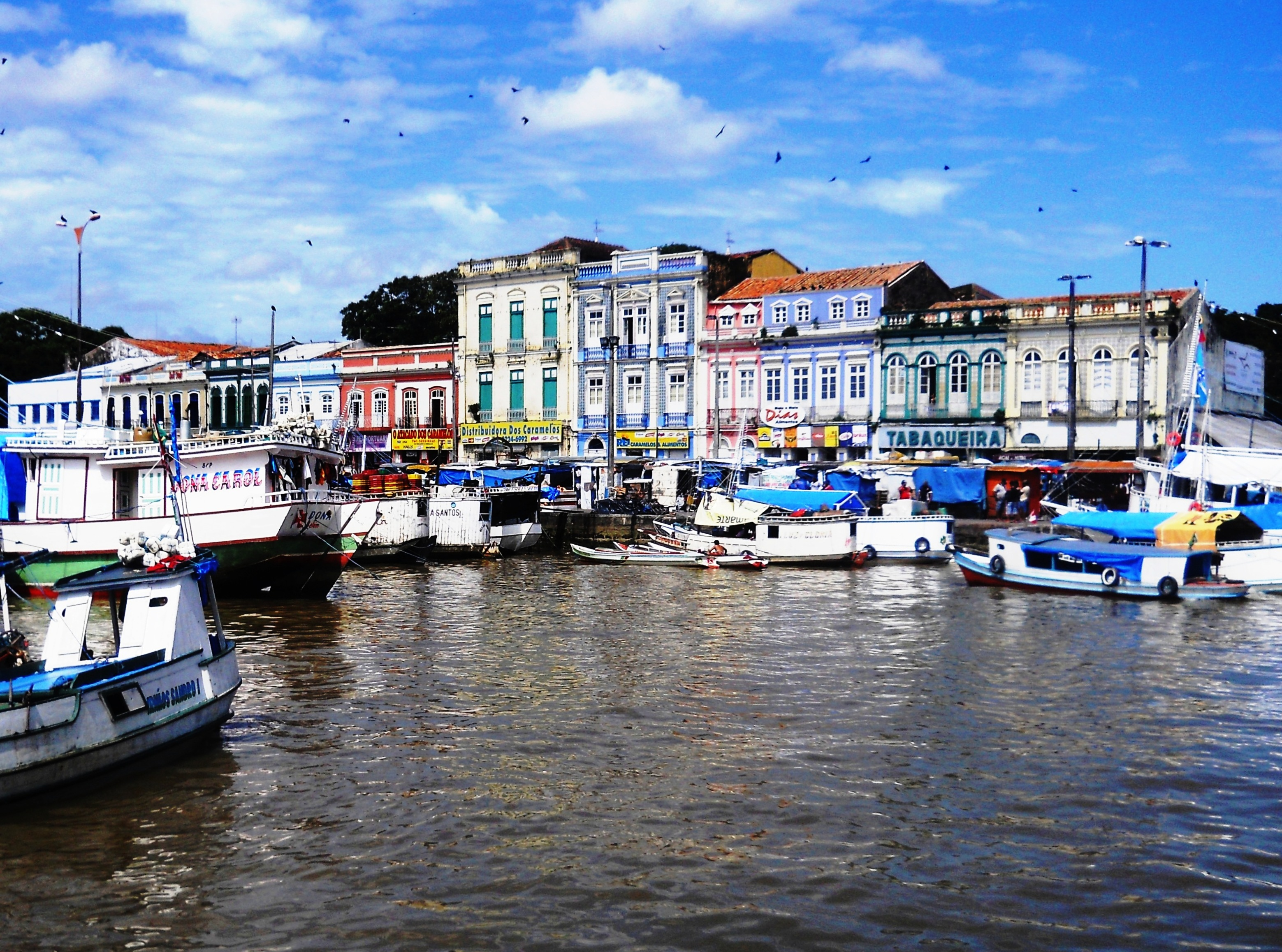 Conjunto Arquitetônico, Urbanístico e Paisagístico da Praça Frei Caetano Brandão, Ex-largo da Sé ; Largo da Sé (Antigo) (Belém, PA)